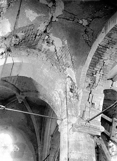 Base du clocher, vue vers le nord-est.